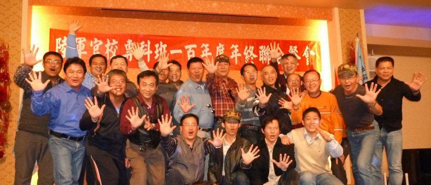 慶祝中華民國建國百年，陸軍官校專科班100年度年終聯合餐會於臺中市西屯區國際街東海漁村花園婚禮會館辦理。